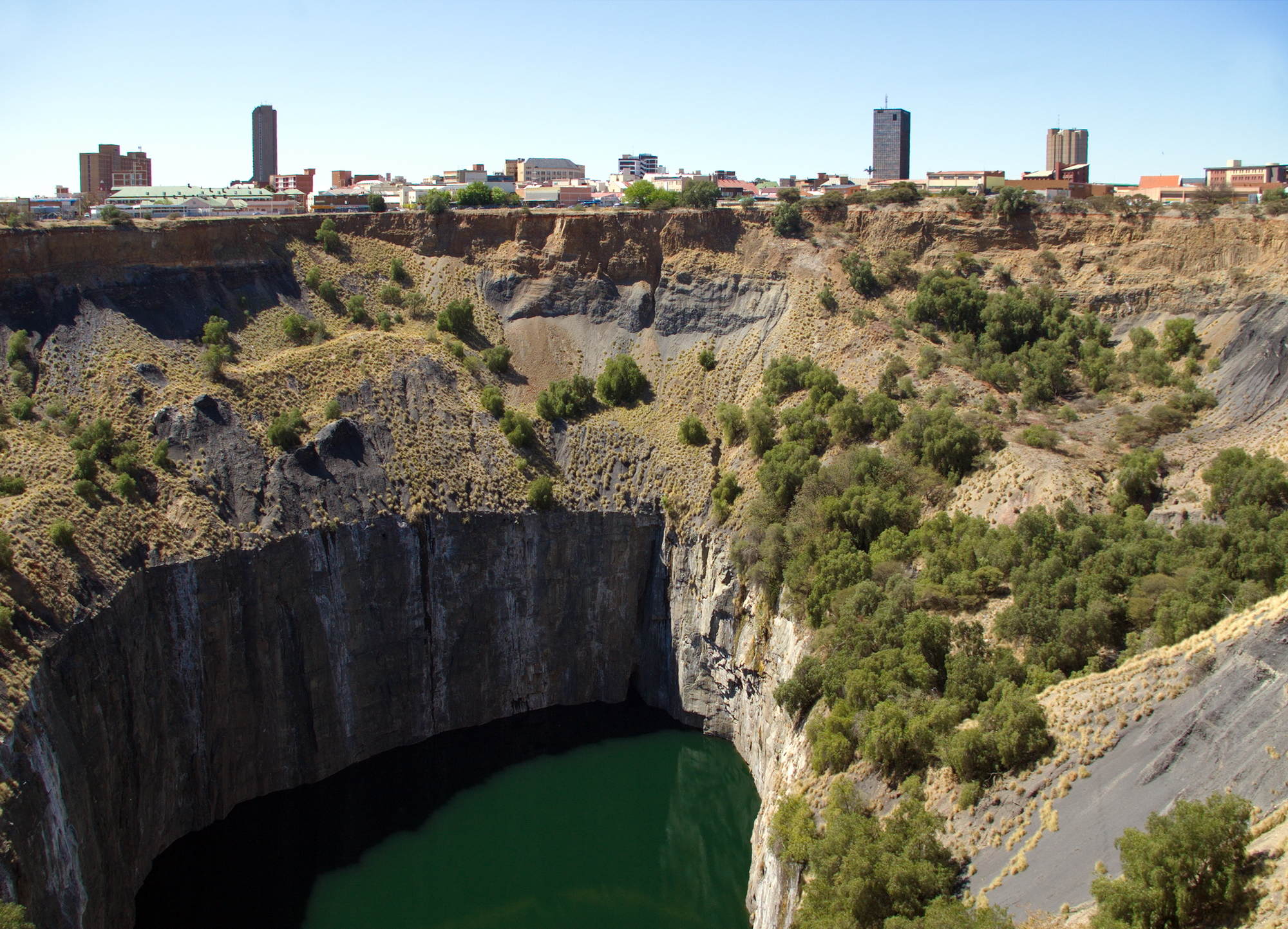 Kimberly, Big Hole, Kimberley, Republic of South Africa